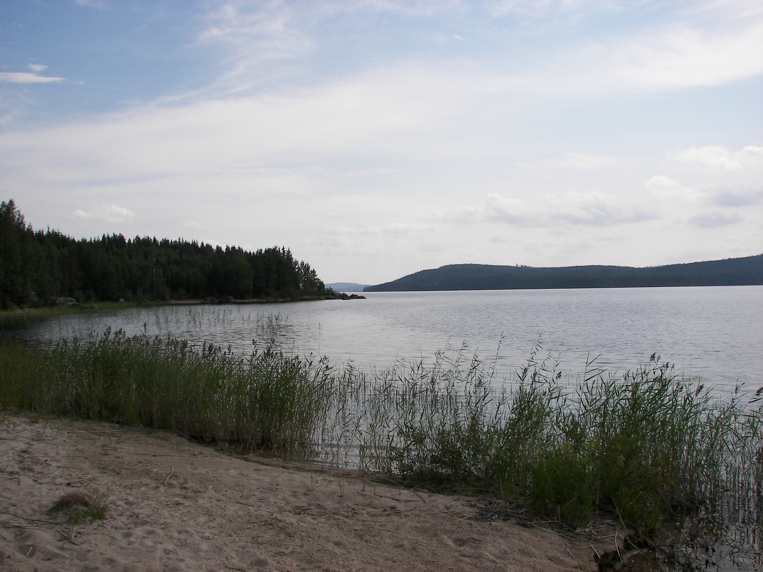 Betarsjön sett från strand vid Betarsjönäset